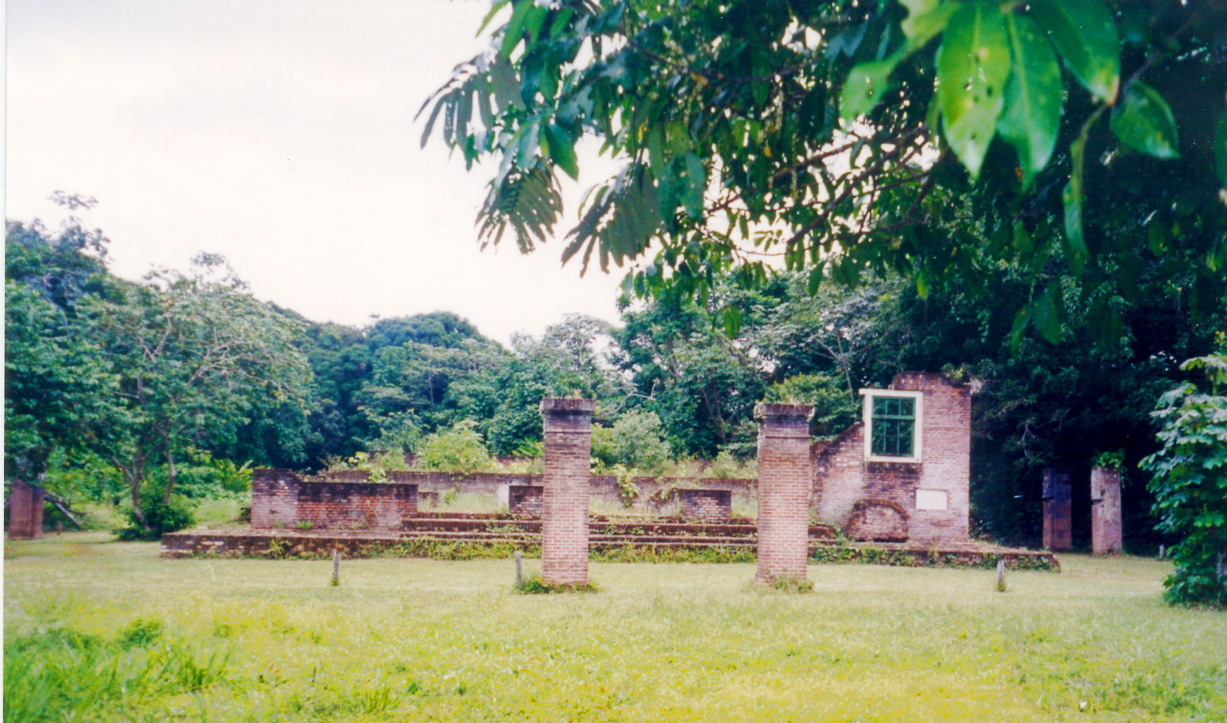 De restanten van de synagoge op de jodensavanne, eigen foto beschikbaar gesteld voor publiek domein.